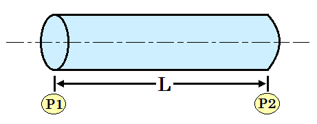 La presión a lo largo de 2 puntos en una longitud L.